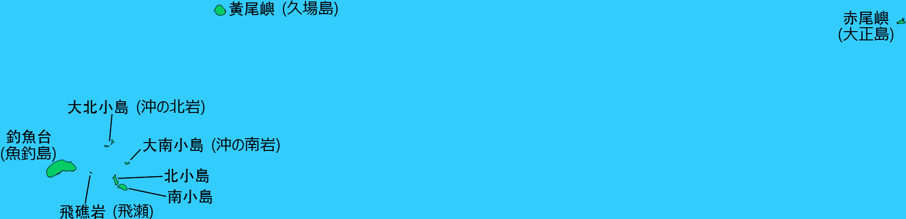 釣魚台列嶼示意圖